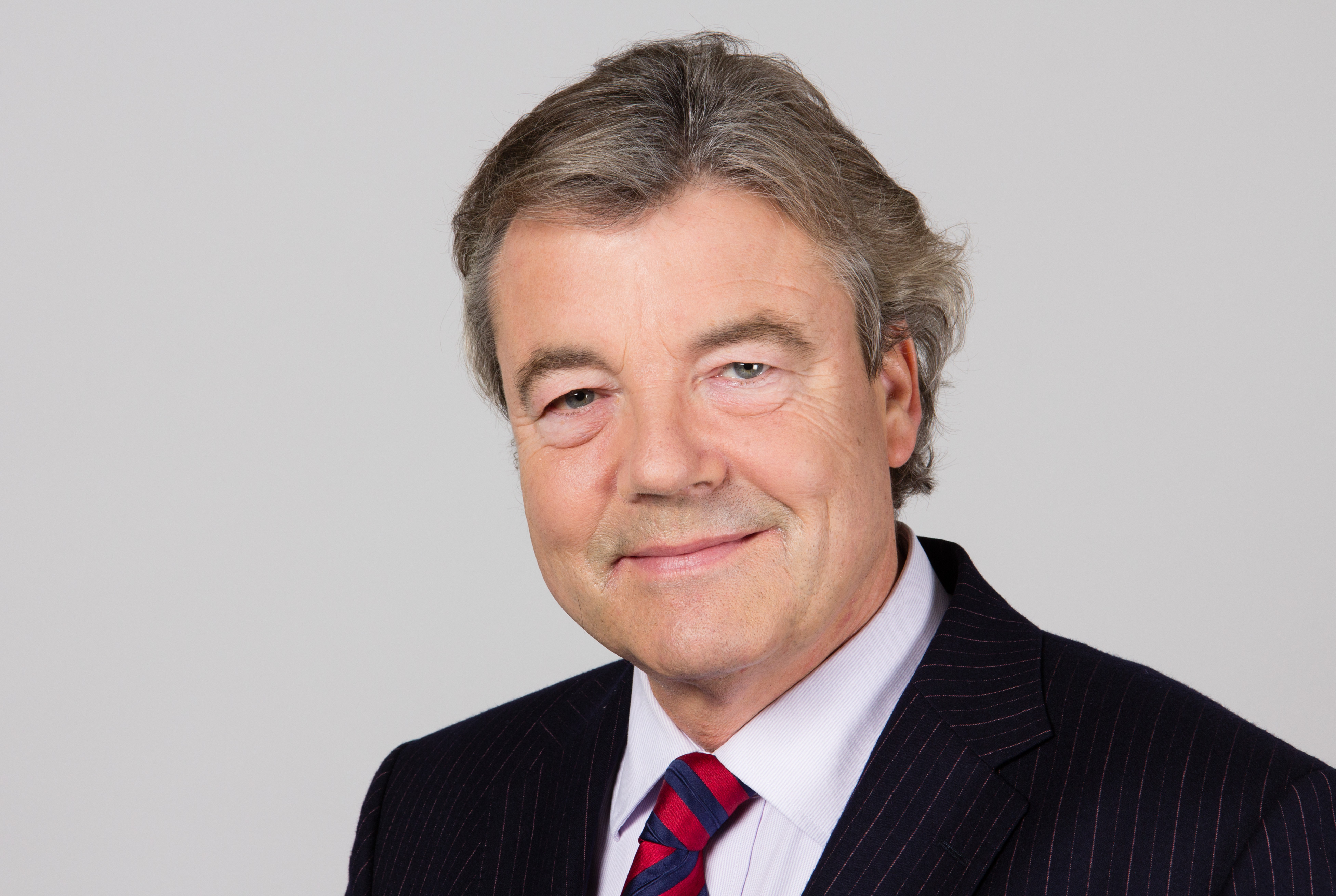 Thomas Stritzl (* 22. September 1957 in Hamburg) ist ein deutscher Politiker (CDU). Wikipedia-Bundestagsprojekt 2014 8–12 September 2014 in BerlinThis file was taken during the project “Wiki loves parliaments/Bundestag 2014” (German). Organisation: Martin Rulsch, Olaf KosinskyDesign: Martin KraftPhotography: Foto-AG Gymnasium Melle (Jan-Kristof Blömke, Lukas Eismann, Moritz Kosinsky, Laura Lessing, Karsten Mosebach, Mascha Mosebach, Teresa Schreer, Noah Sewöster, Niklas Tschöpe), Olaf Kosinsky, Martin Kraft, Harald Krichel, Steffen Prößdorf, Ralf Roletschek, Martin Rulsch, Gerd Seidel, Sven TeschkeVideo: Marc Rudnick, Manuel SchneiderEditors: Marcus Cyron, Günter Fremuth, Martin Kraft, Robin Krahl, Harald Krichel, Martin Rulsch, WikiAnikaReception: DasMonstaaa, Leonie Rabea Große, Lutheraner, Nina Möllering, Martin Rulsch, WikiAnika, Foto-AG Gymnasium MelleCosmetics: Regina Bosak, Bettina Dieguez, Sandra Kobbe, Andrea Strehlke; Irada Abdullayeva, Vivien Abelmann, Olena Engelbrecht, Sarah Fabini, Nina Magnus, Jacqueline Schmidt, Leonie Taboada, Julia Willer Usage information If you need more information how to use this file, please send an email to . Personality rights warningAlthough this work is freely licensed or in the public domain, the person(s) shown may have rights that legally restrict certain re-uses unless those depicted consent to such uses. In these cases, a model release or other evidence of consent could protect you from infringement claims.